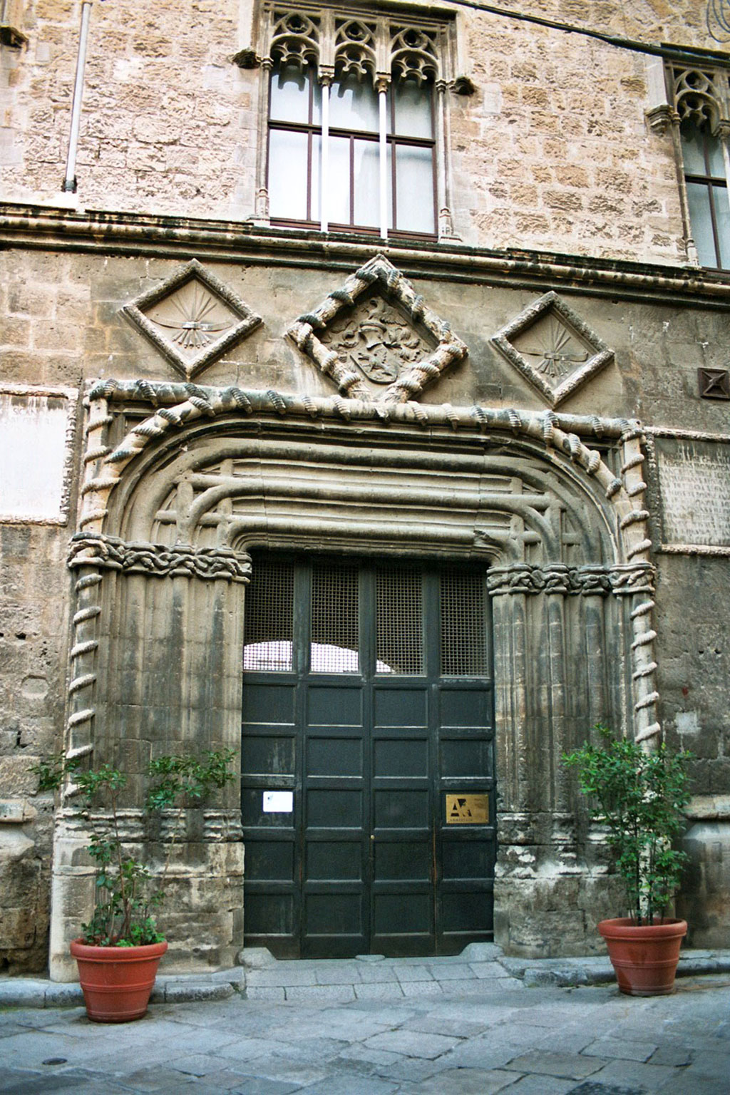 Palazzo Abatellis, Palermo Late gothic portal